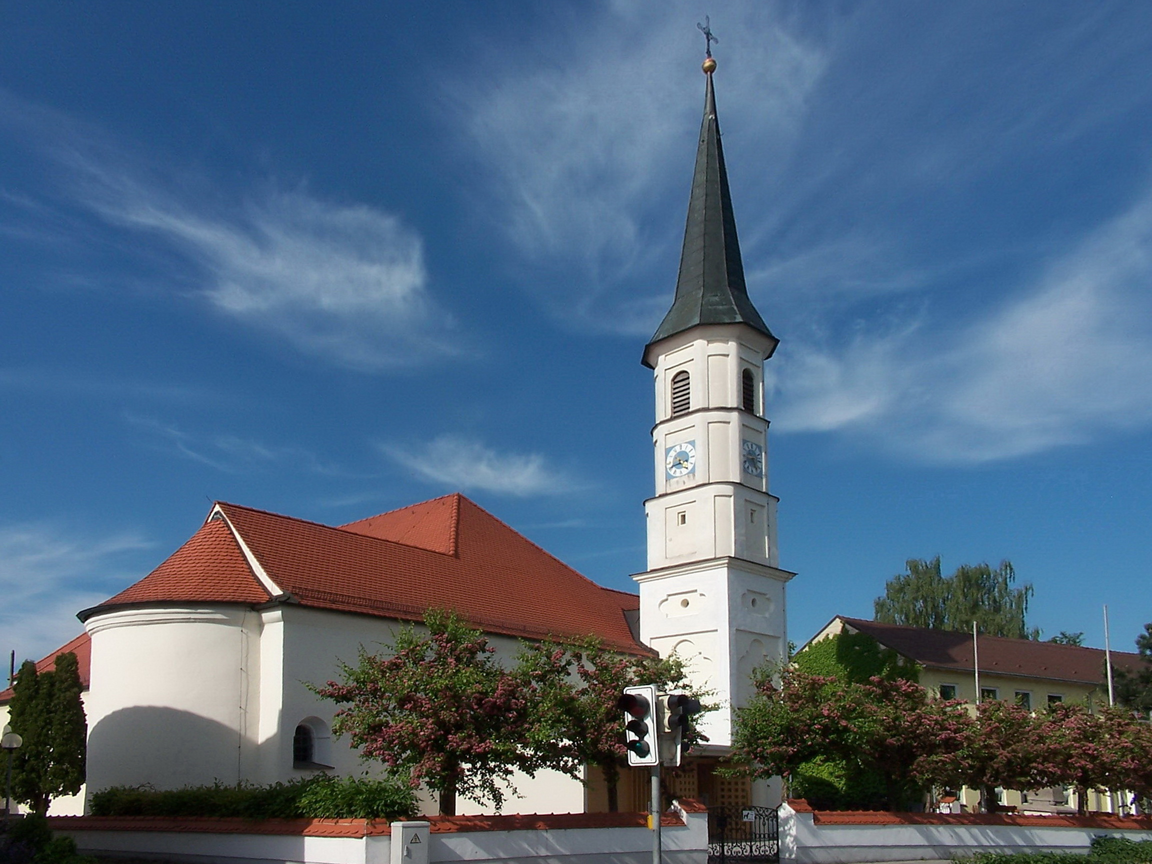 Wörth an der Isar. Katholische Kirche St. Laurentius, romanischer Westchor, Langhaus Ende 17. Jahrhundert, modern erweitert; mit Ausstattung.